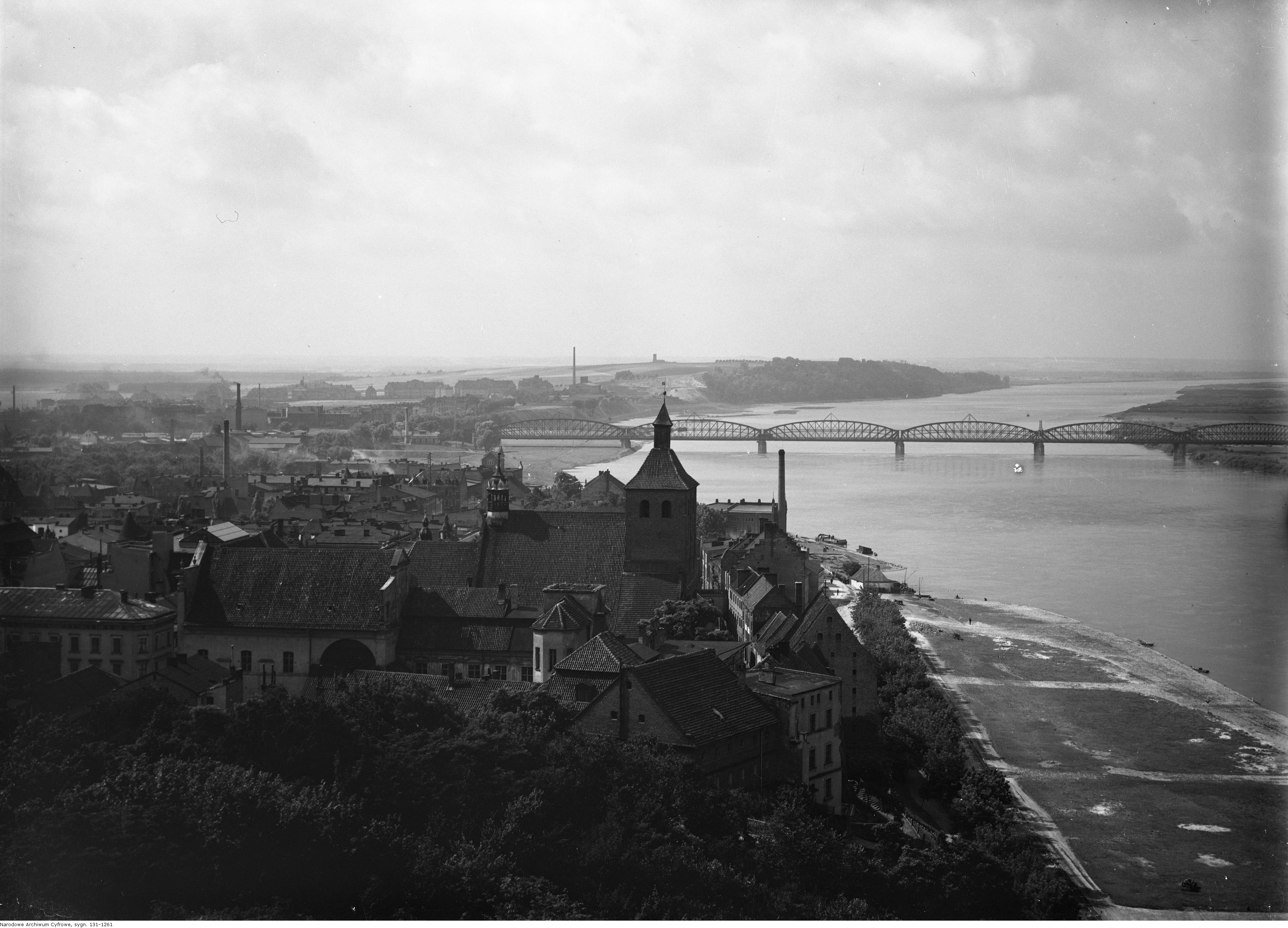 Widok z zamku na Wisłę.